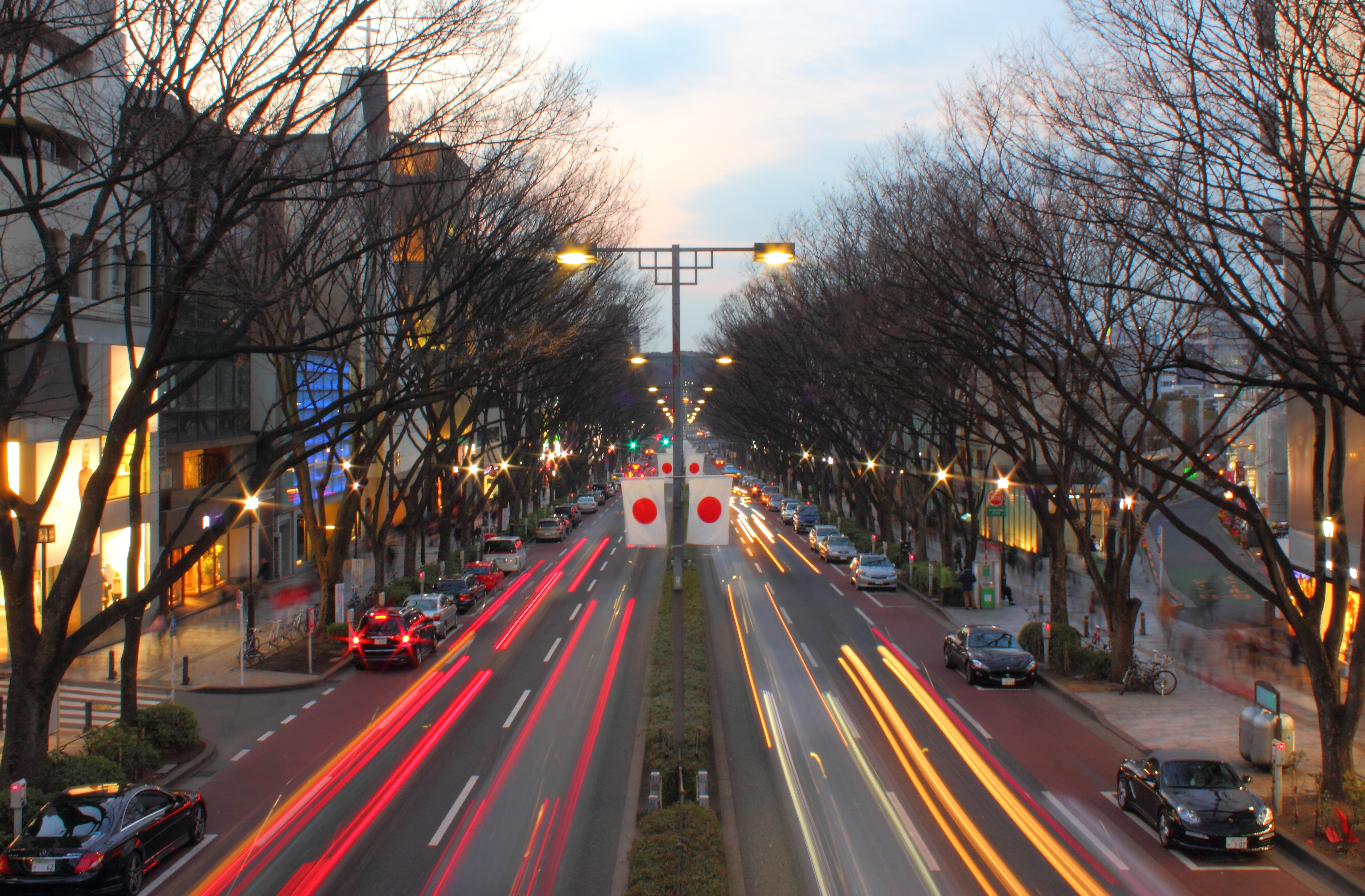 表参道（東京・原宿）